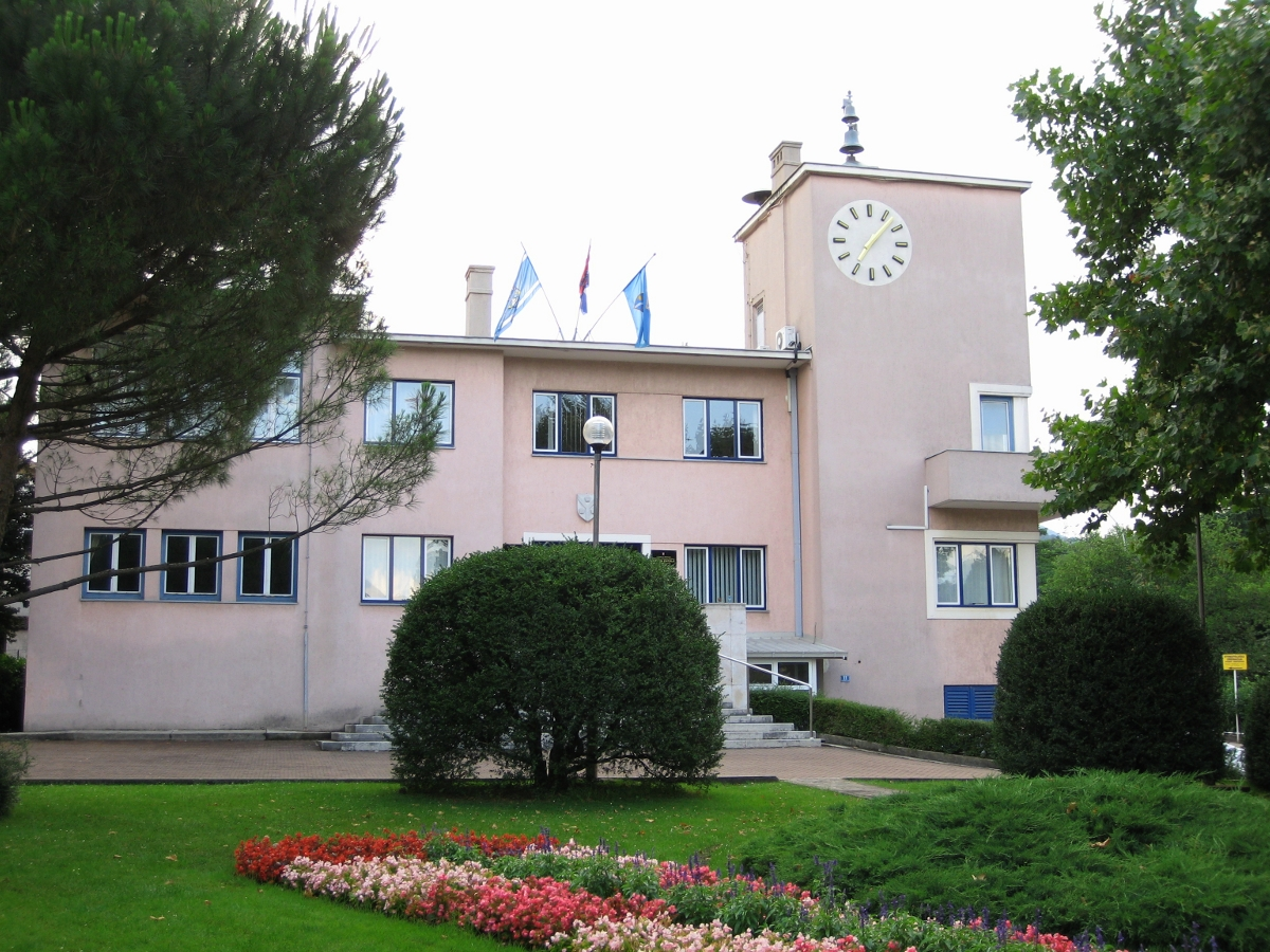 Zgrada Općine Matulji